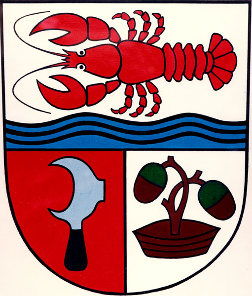 Znak obce Pasohlávky